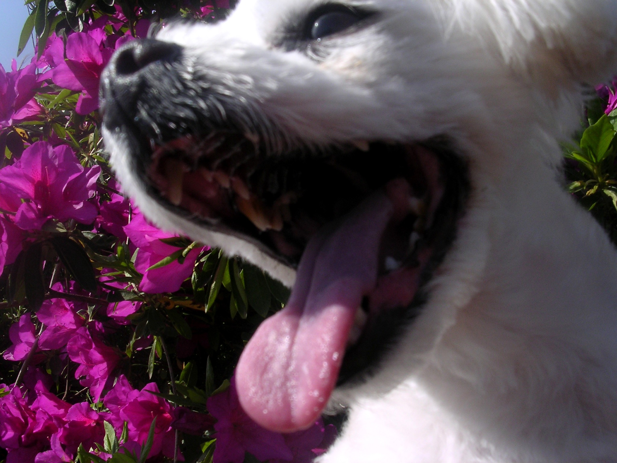 joy